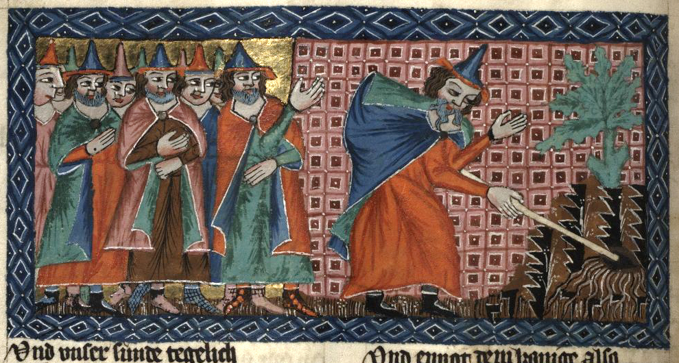 Rudolf von Ems: Weltchronik. Böhmen (Prag), 3. Viertel 14. Jahrhundert. Hochschul- und Landesbibliothek Fulda, Aa 88. Bildbeschreibung nach Martin Roland. Miniatur 62 132v Mose schlägt Wasser aus dem Felsen